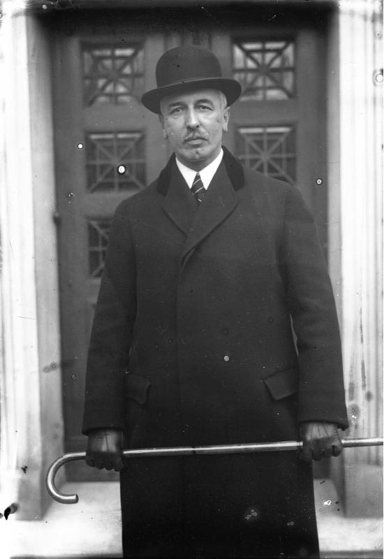 Der ehemalige Reichsschatzmeister Dr. Albert, wurde in den Vorstand des Norddeutschen Lloyd Bremen berufen ! Dr.ing.H.F. Albert, das neue Vorstandsmitglied des Norddeutschen Lloyd Bremen.